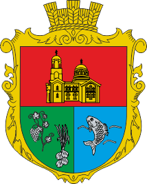 Герб села Криничне (Болградський район)